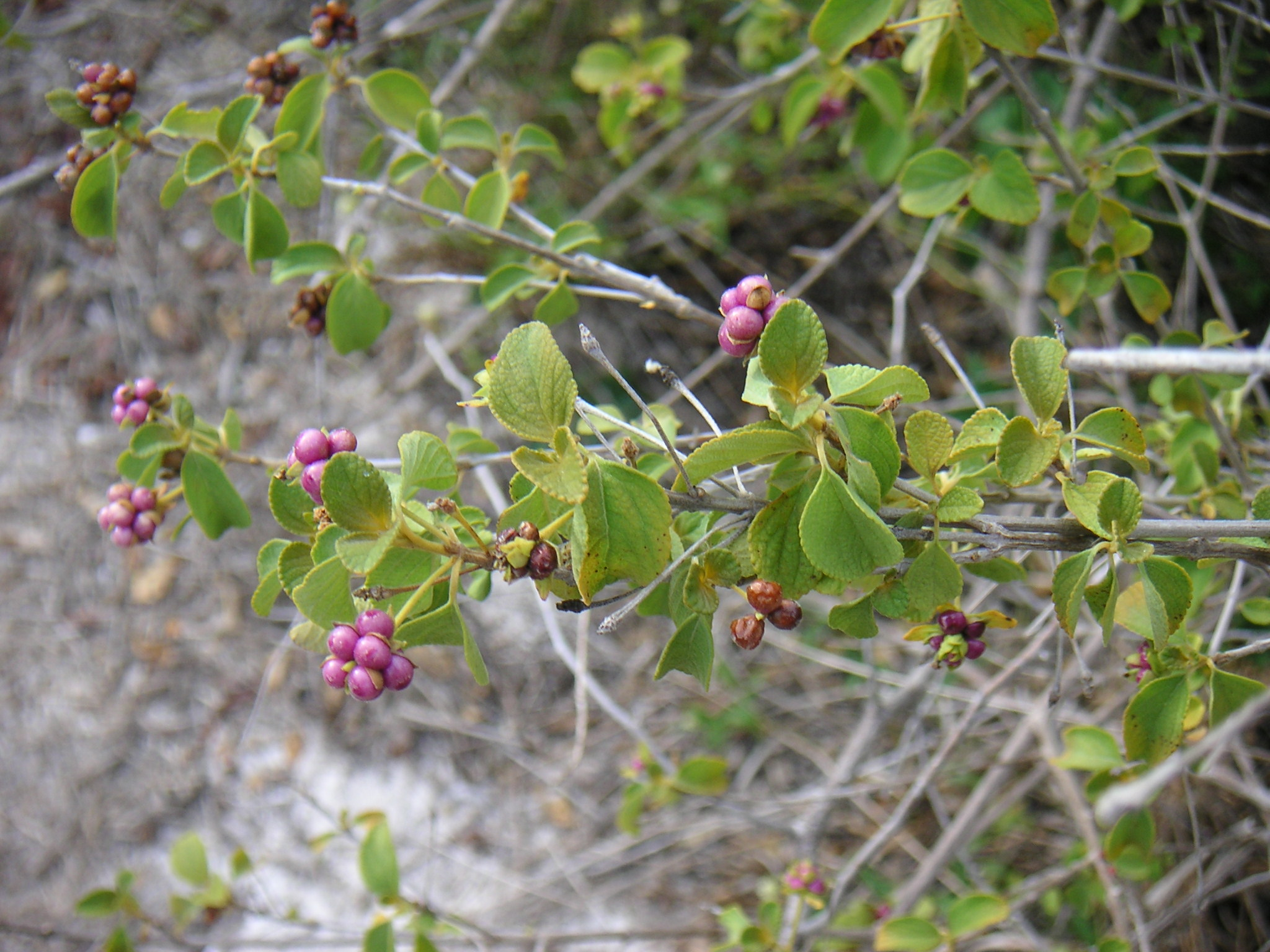 Lantana involucrata, Florida Keys